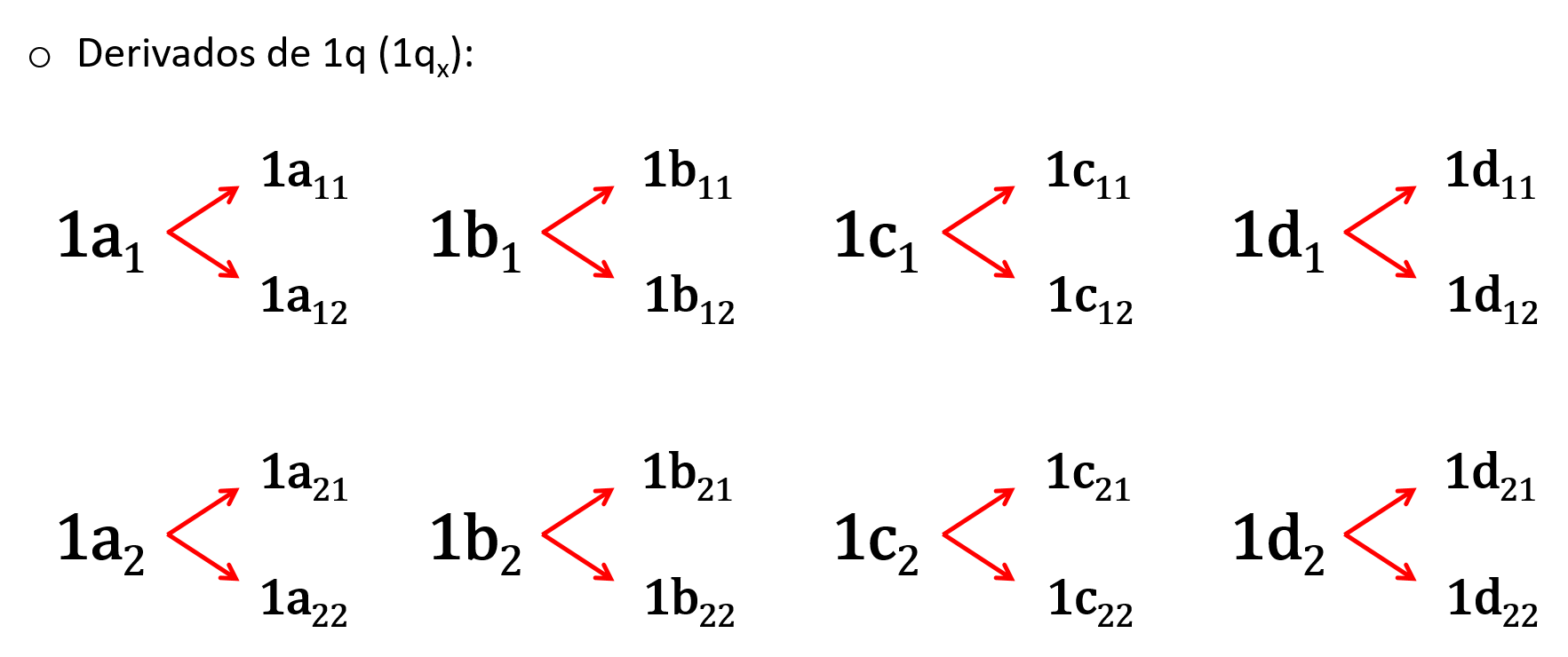 Derivados de 1q (1qx)